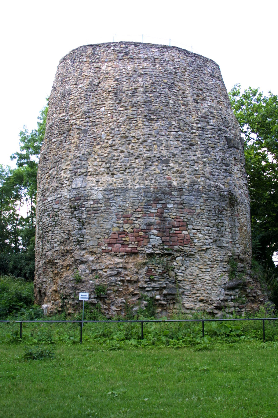 "Drususstein" auf dem Gelände der Zitadelle Mainz. Es handelt sich hierbei höchstwahrscheinlich um den in der antiken Literatur erwähnten Kenotaph des Drusus in Mogontiacum.